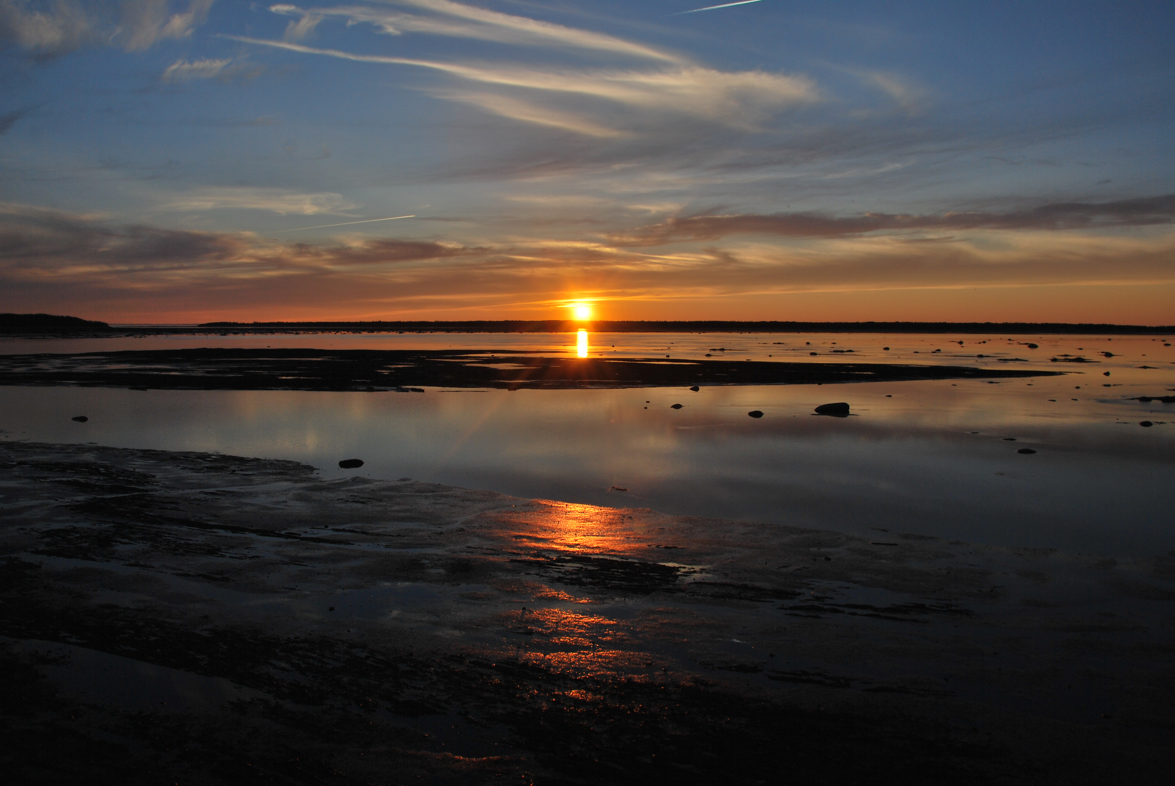 Rimouski.